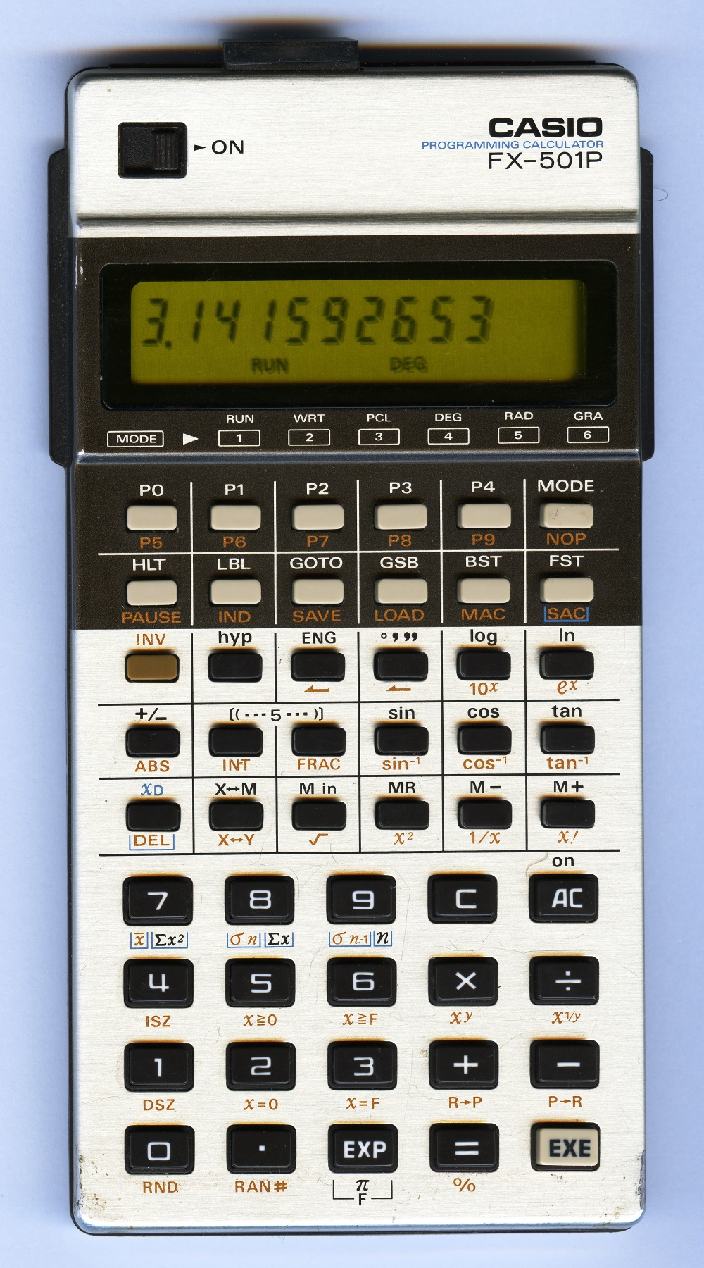 kalkulator Casio FX 501 P